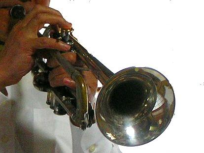 使用楽器 B♭管はYAMAHA・Xeno（型番は未確認）だが各部分を改良している。 C管は使用楽器を確認できていない。 ピッコロトランペットはベルが木製のものを使用（形状からストンビ製と推測）。 スライド付きトランペット「Zephyros」を発案し、これまでにYAHAMA、GROBAL、BEST BRASSの各社で製作。中川俊郎など多くの作曲からZephyros用の曲が寄せられている。 マウスピースはBEST BRASSの曽我部清典モデル。 BEST BRASSの濱永晋二と共同して音程のよいワウワウミュートを開発している。